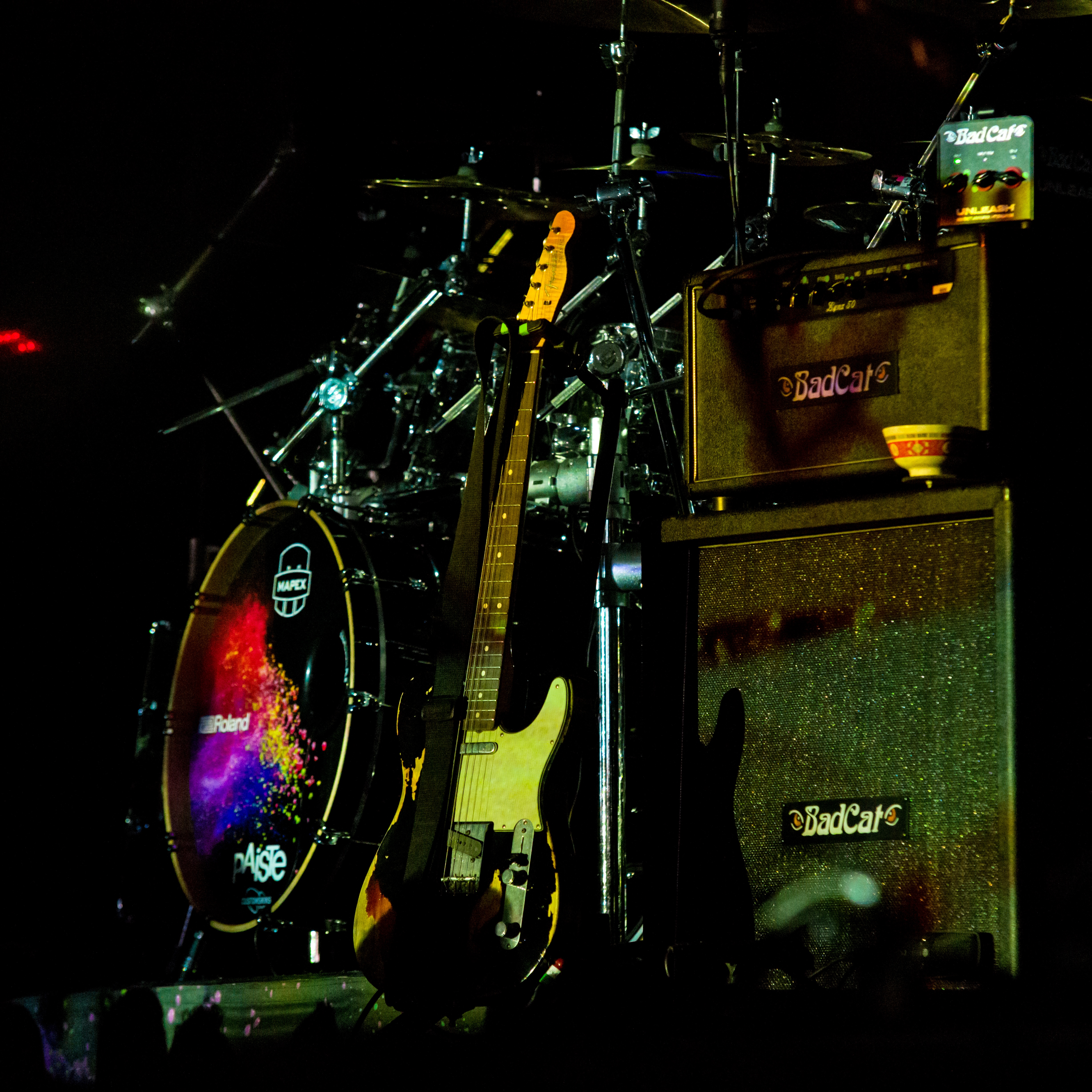 Bilder vom Zelt Musik Festival 2018 in Freiburg im Breisgau Das Eröffnungskonzert mit Steven Wilson